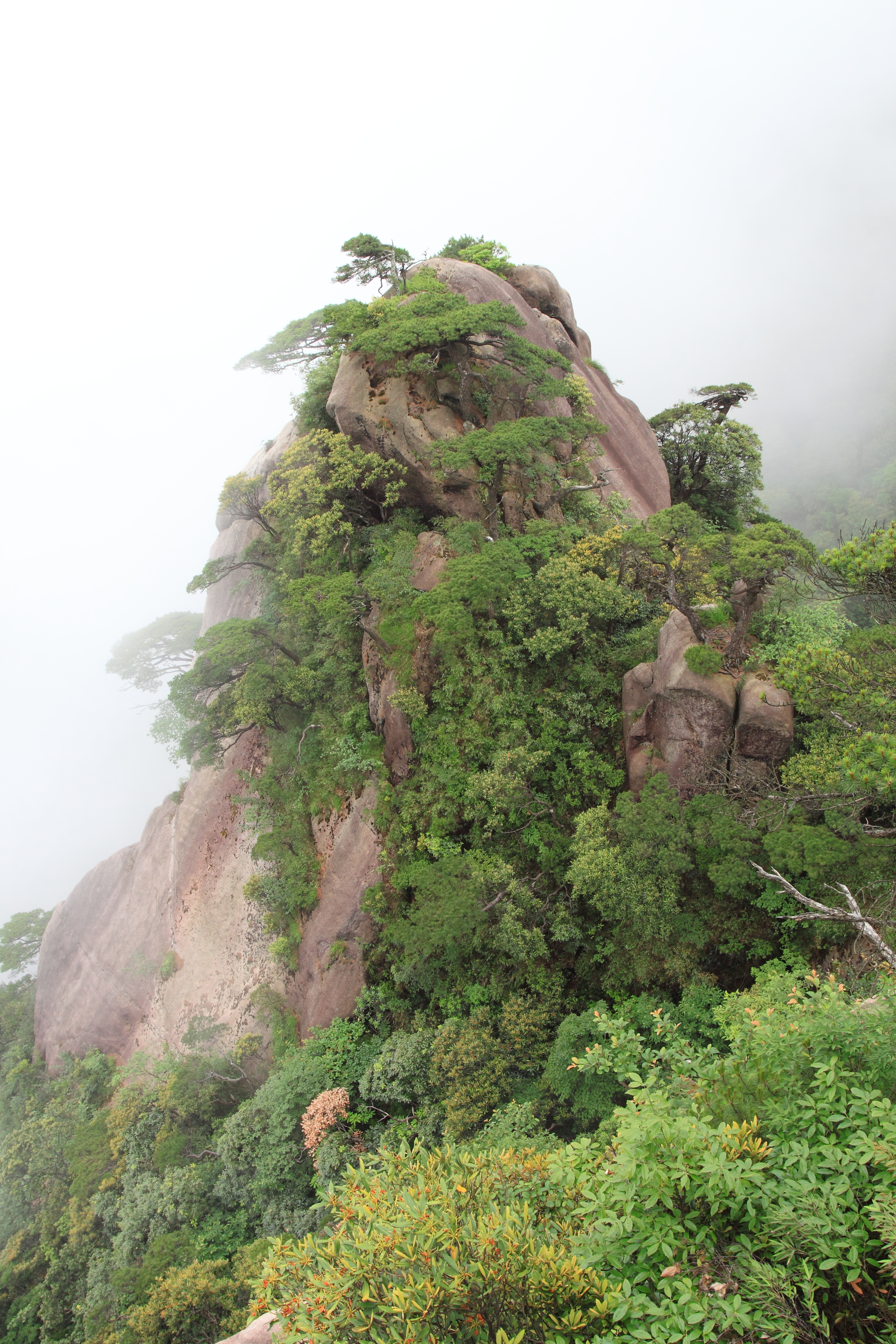 三清山 —— 东海岸